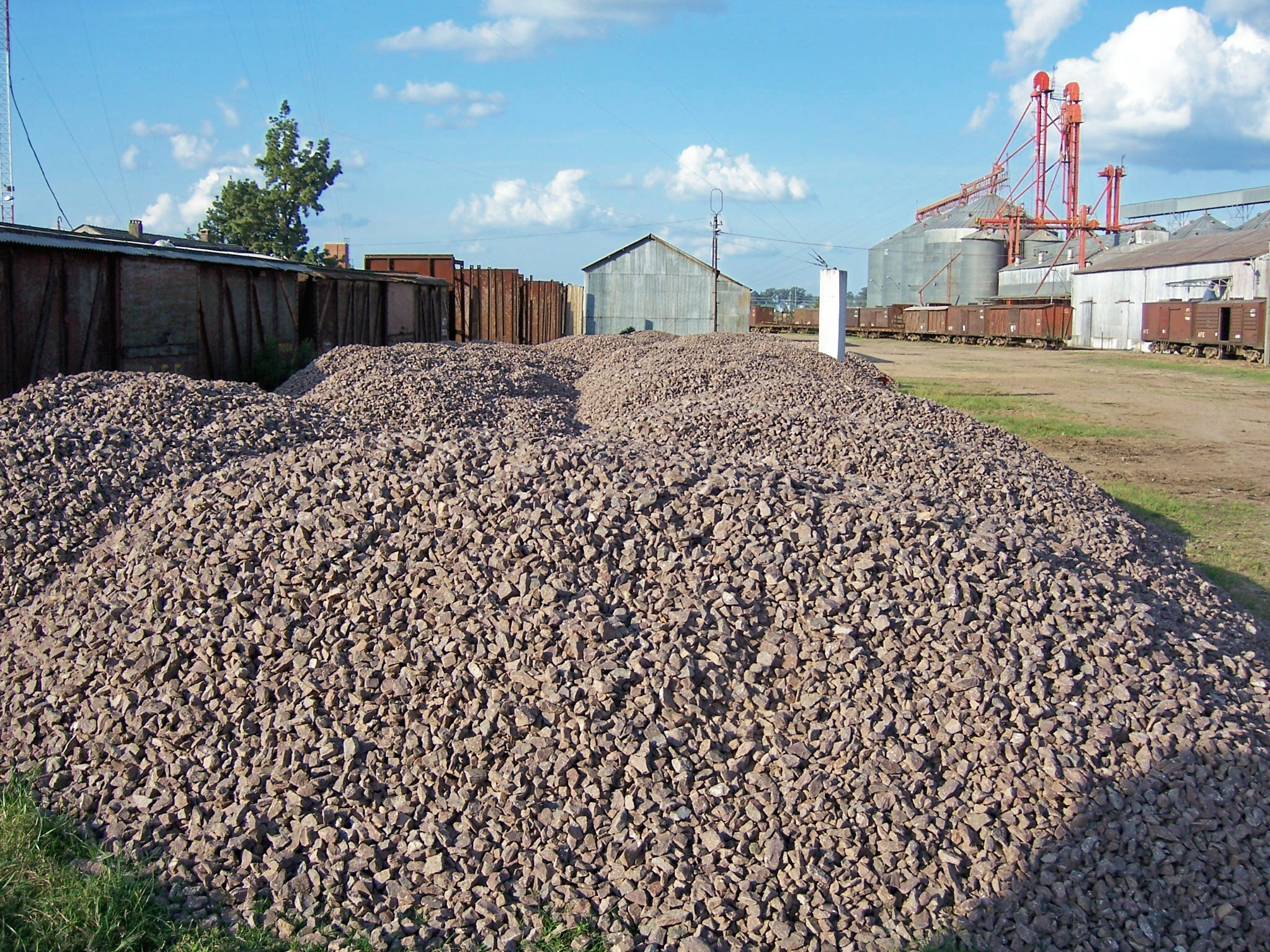 Balasto de vía de material basáltico, Tacuarembó, Uruguay. Acopio realizado en la Estación Tacuarembó para ser utilizado en labores de mantenimiento del ramal entre Estación Queguay y Mina Vichadero, propiedad de ANCAP, cantera de caliza que provee a la fábrica de cemento portland existente en Paysandú.